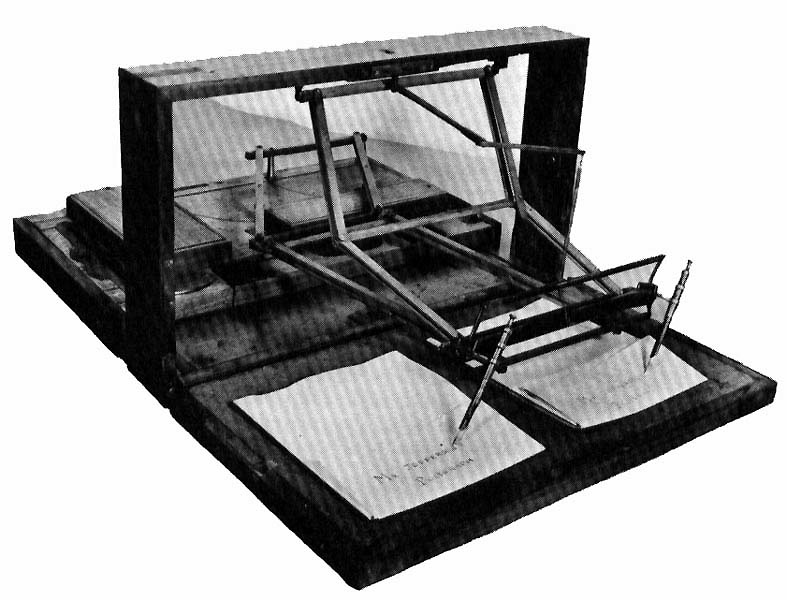 Der Polygraph von Thomas Jefferson - eine frühe Form der "Schreibmaschine" bzw. des Kopiergeräts - erlaubte die Anfertigung eines "Durchschlags" gleich beim Verfassen eines Schreibens Quelle: Early Office Museum